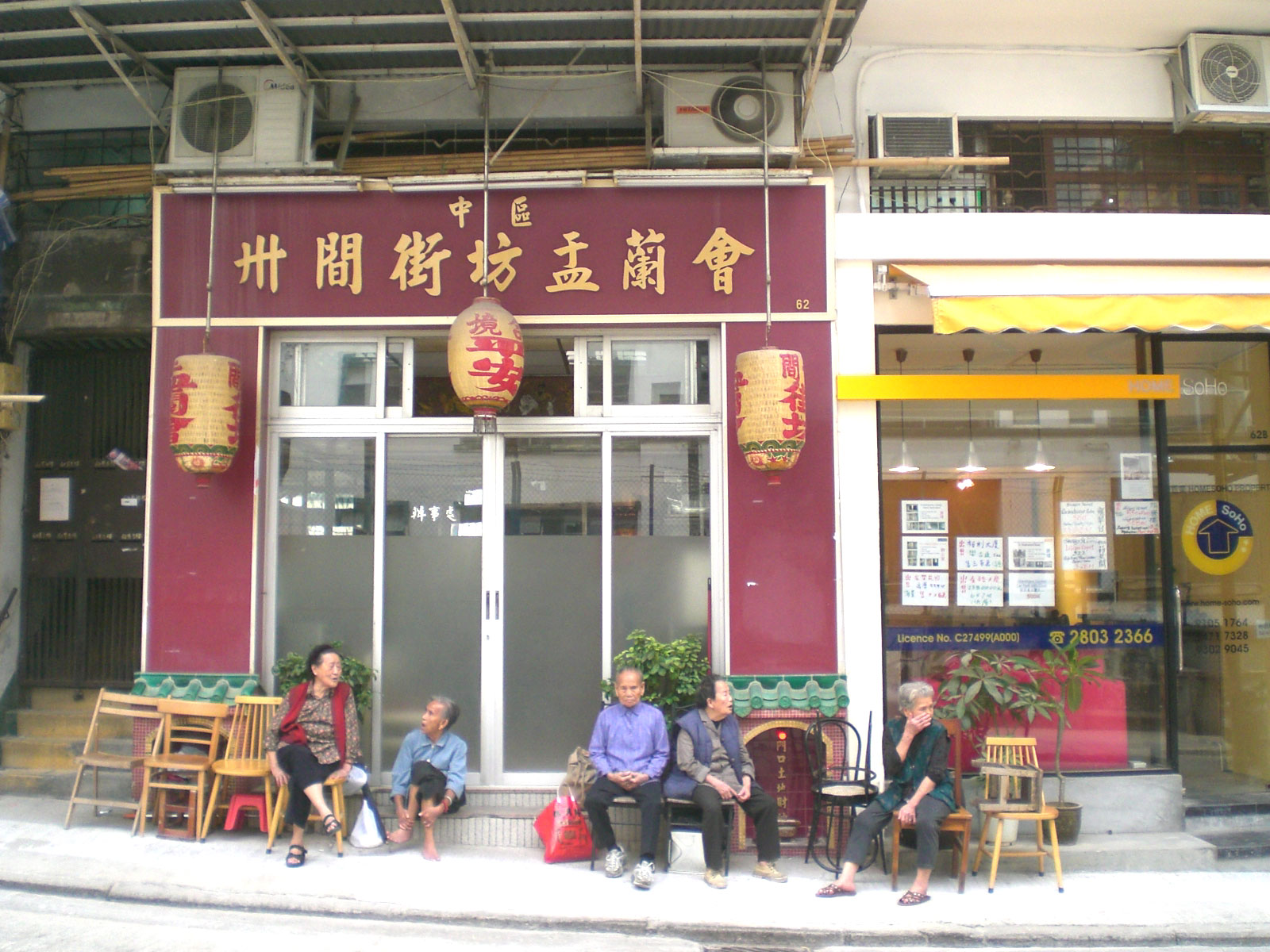 中環蘇豪區士丹頓街中區卅間街坊盂蘭會